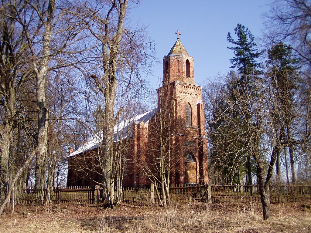 Budbergas luterāņu baznīca 2007-03-24